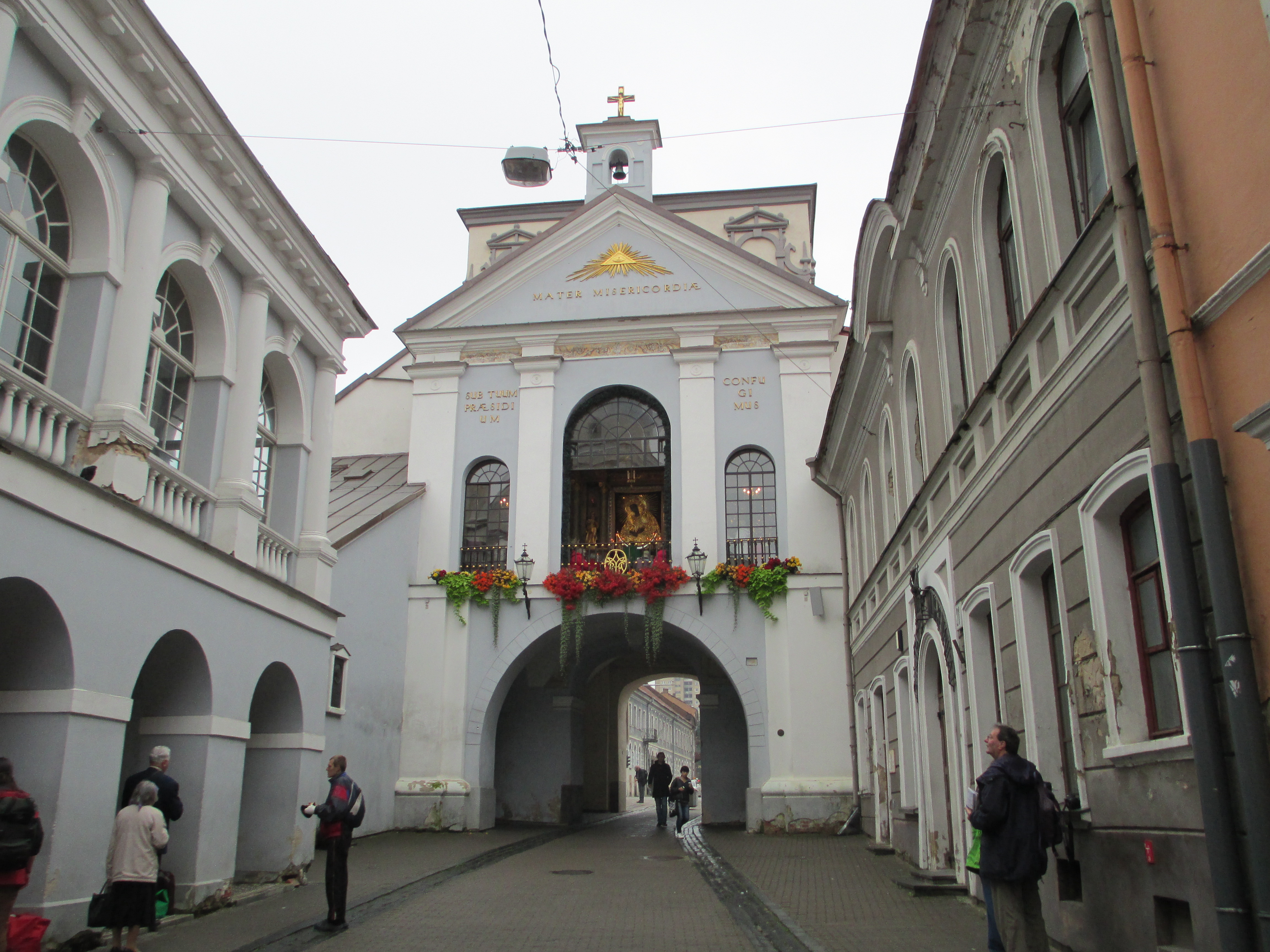 שער השחר בווילנה מבפנים